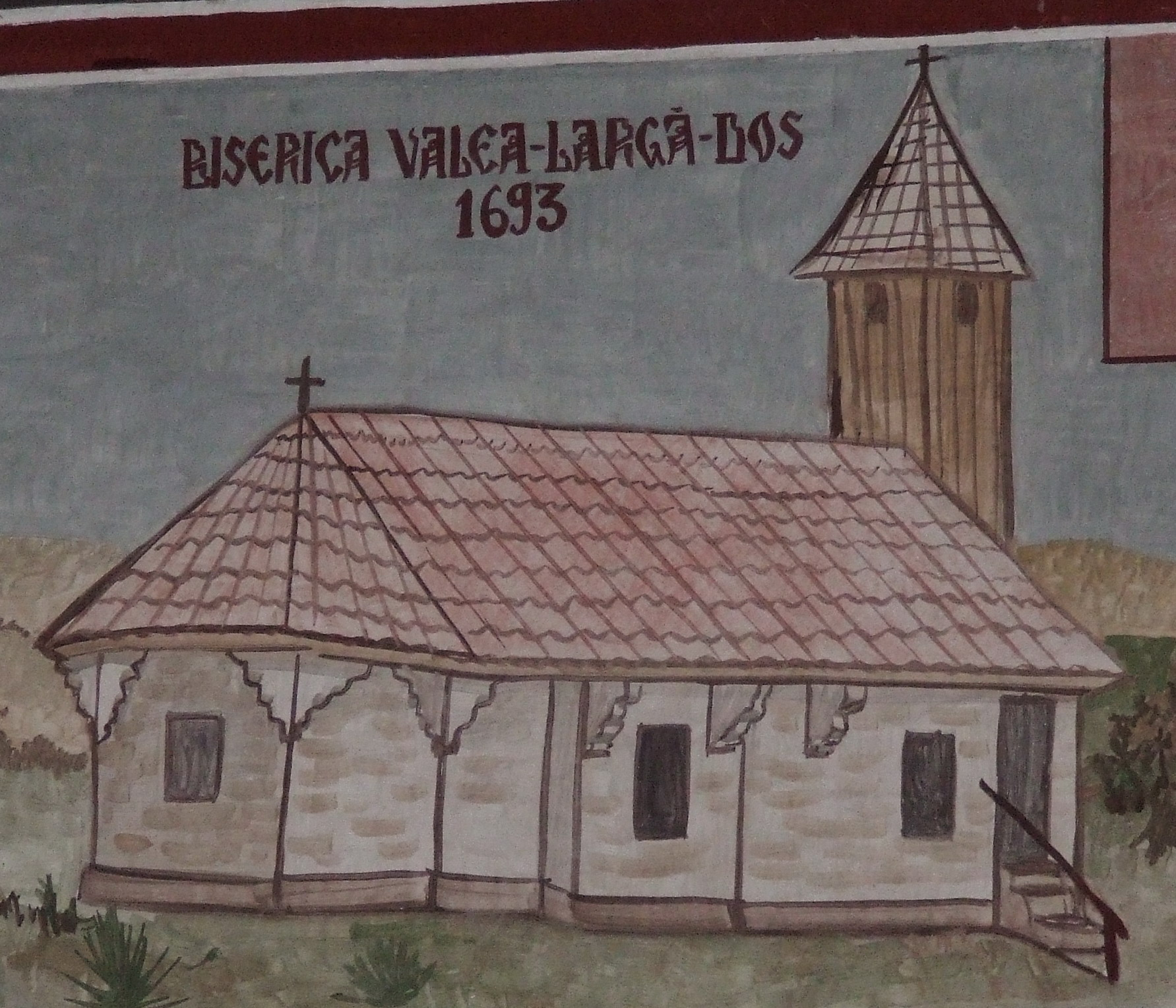 Reprezentarea bisericii de lemn cu hramul Adormirea Maicii Domnului în biserica nouă de zid din Valea Largă, judeţul Mureş.